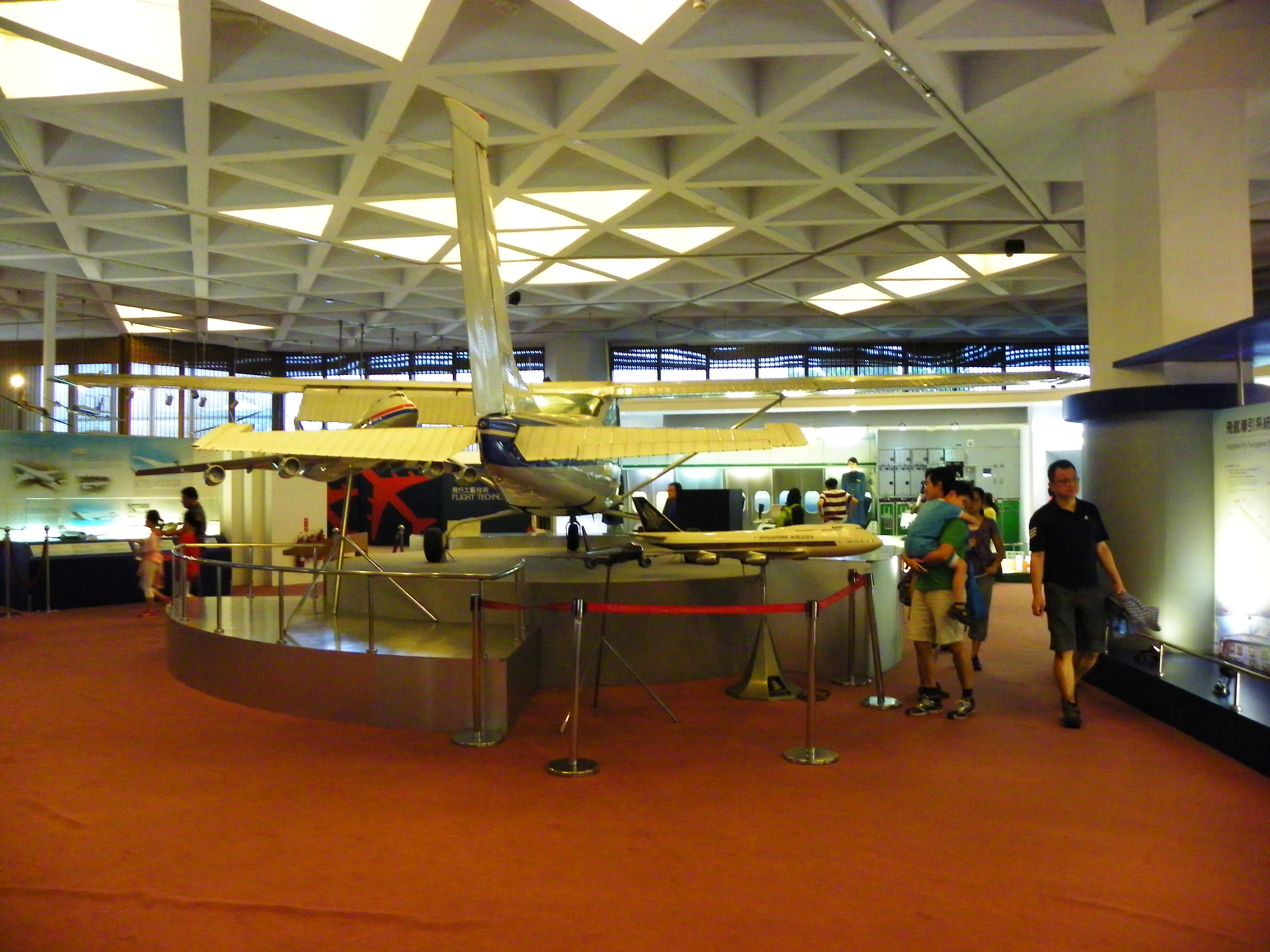 航空科學館民用航空區華僑精神號周圍的遊客。